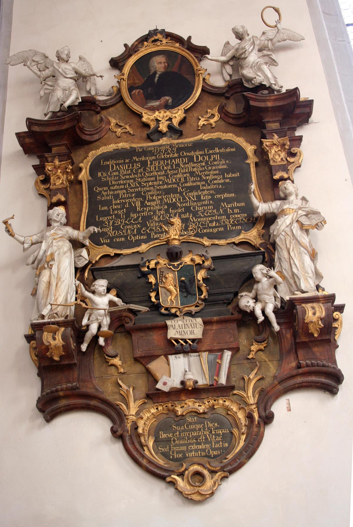 Epitaph Dolp in der Sankt-Georgs-Kirche Nördlingen